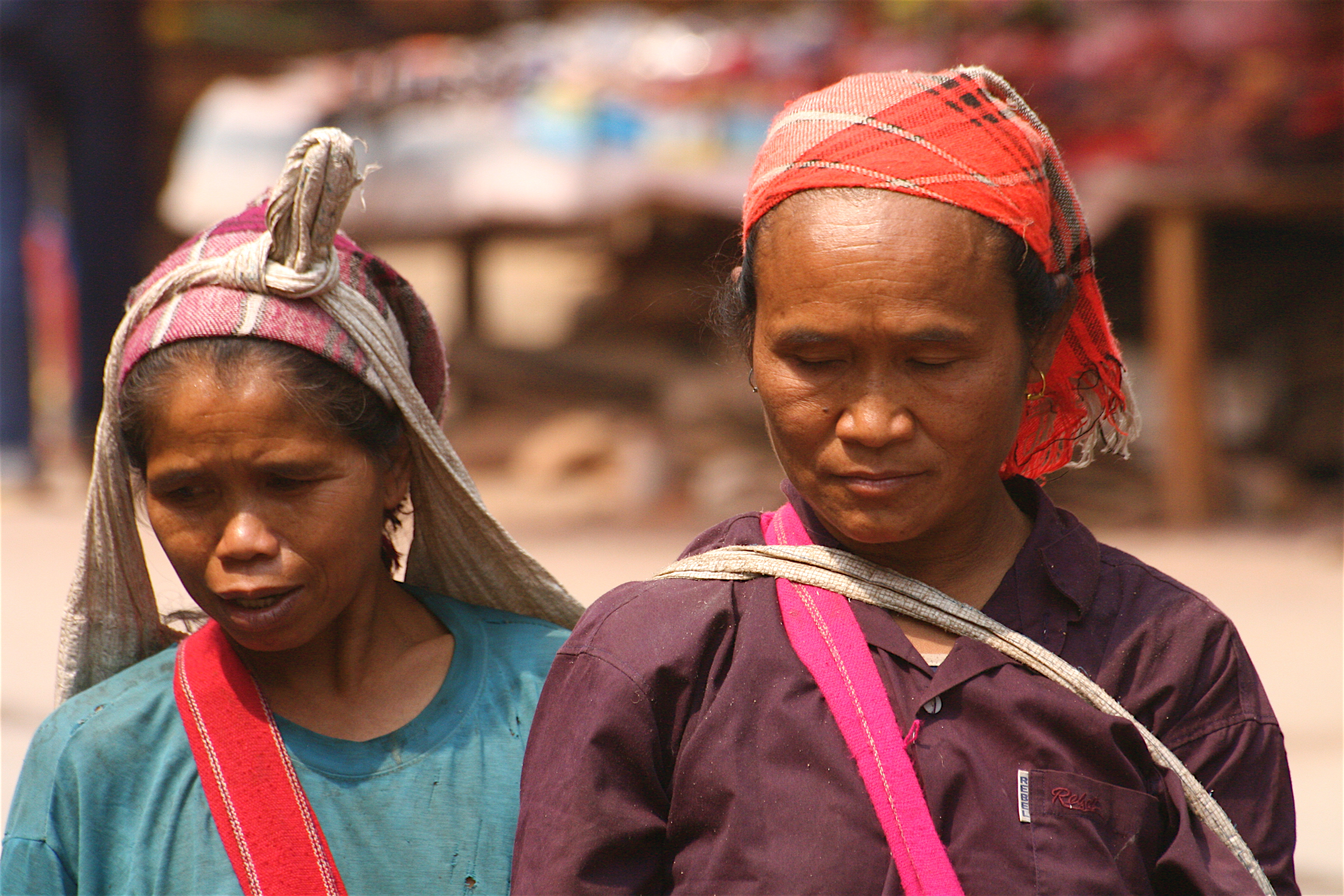 In Pakbeng